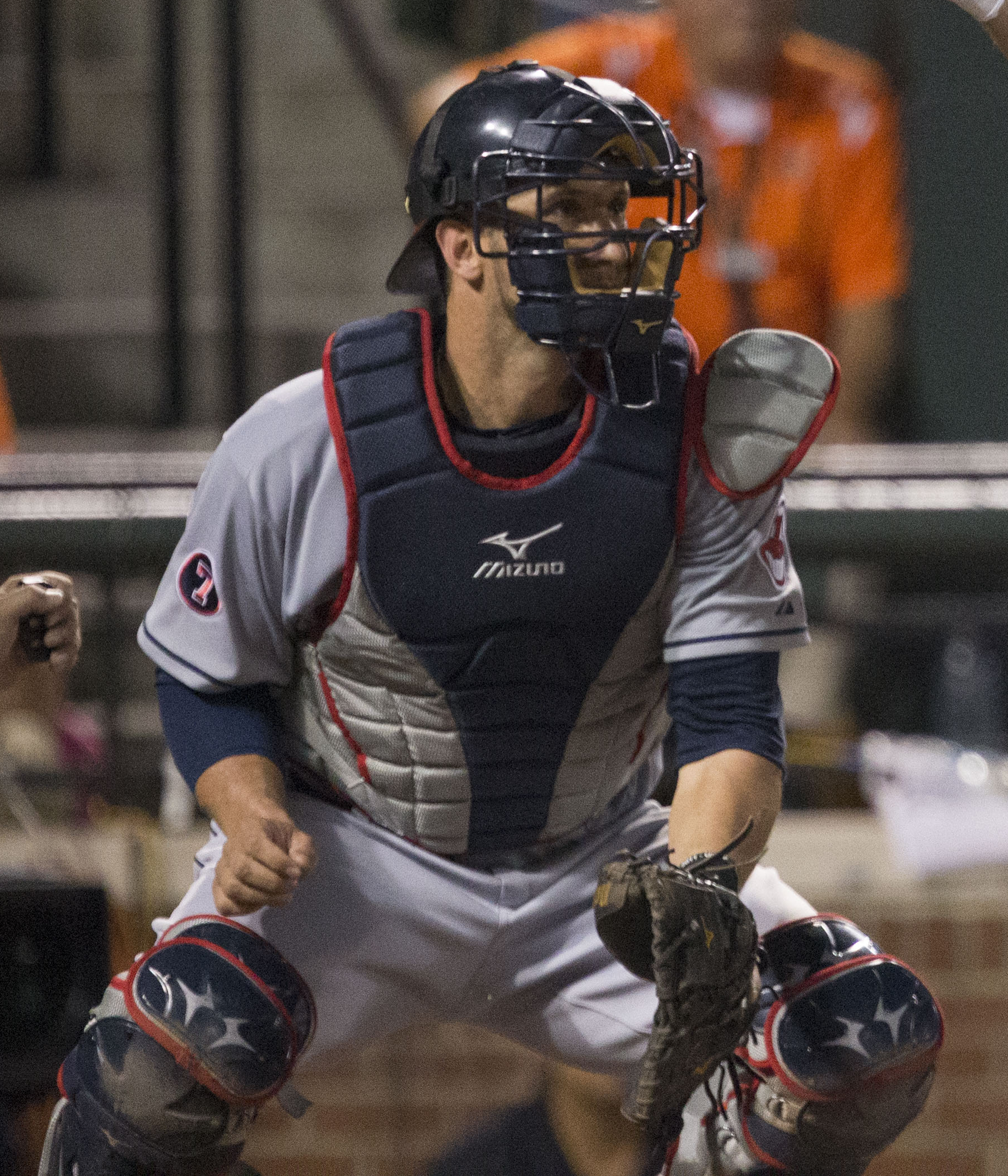 Yan Gomes